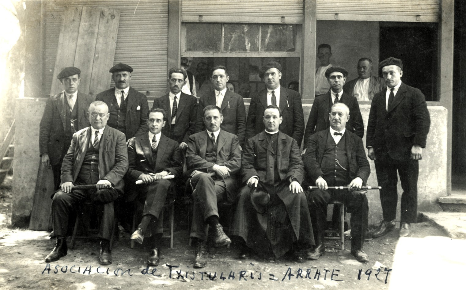 Euskal Herriko Txistulari Elkartearen sorrera batzarra. Arrate (1927). Eskuman, eserita, Martin Elola.